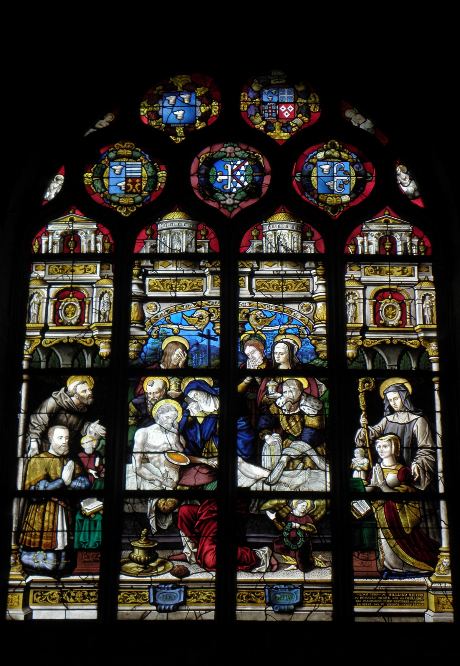 Maîtresse-vitre de l'église Saint-Pierre de Chevaigné (35).